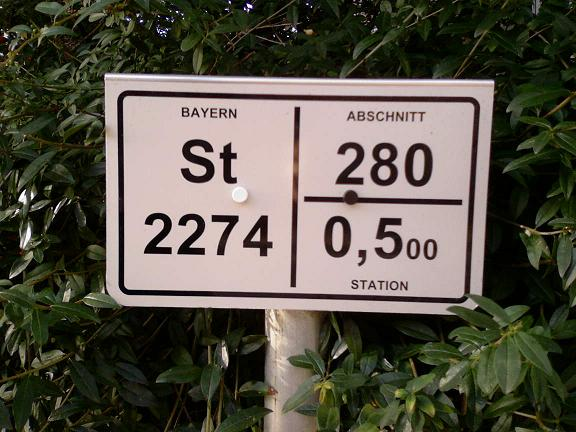 Stationstafel einer Bayerischen Staatstraße.